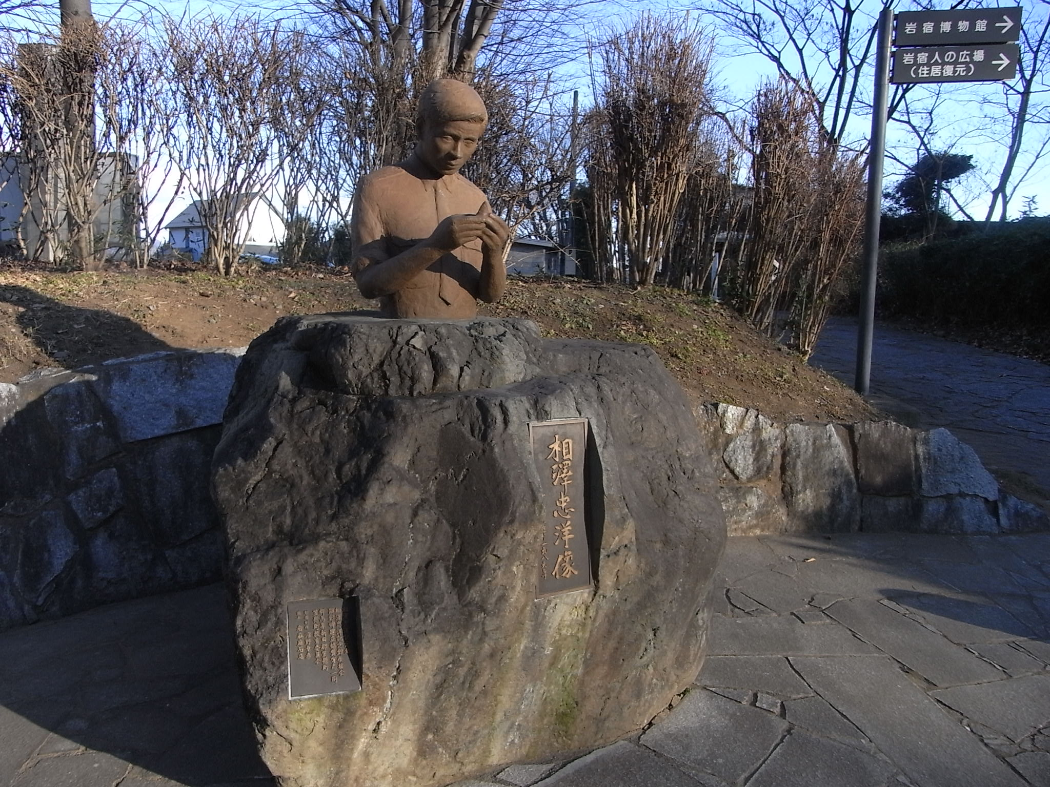 相沢忠洋像（群馬県みどり市 岩宿遺跡）